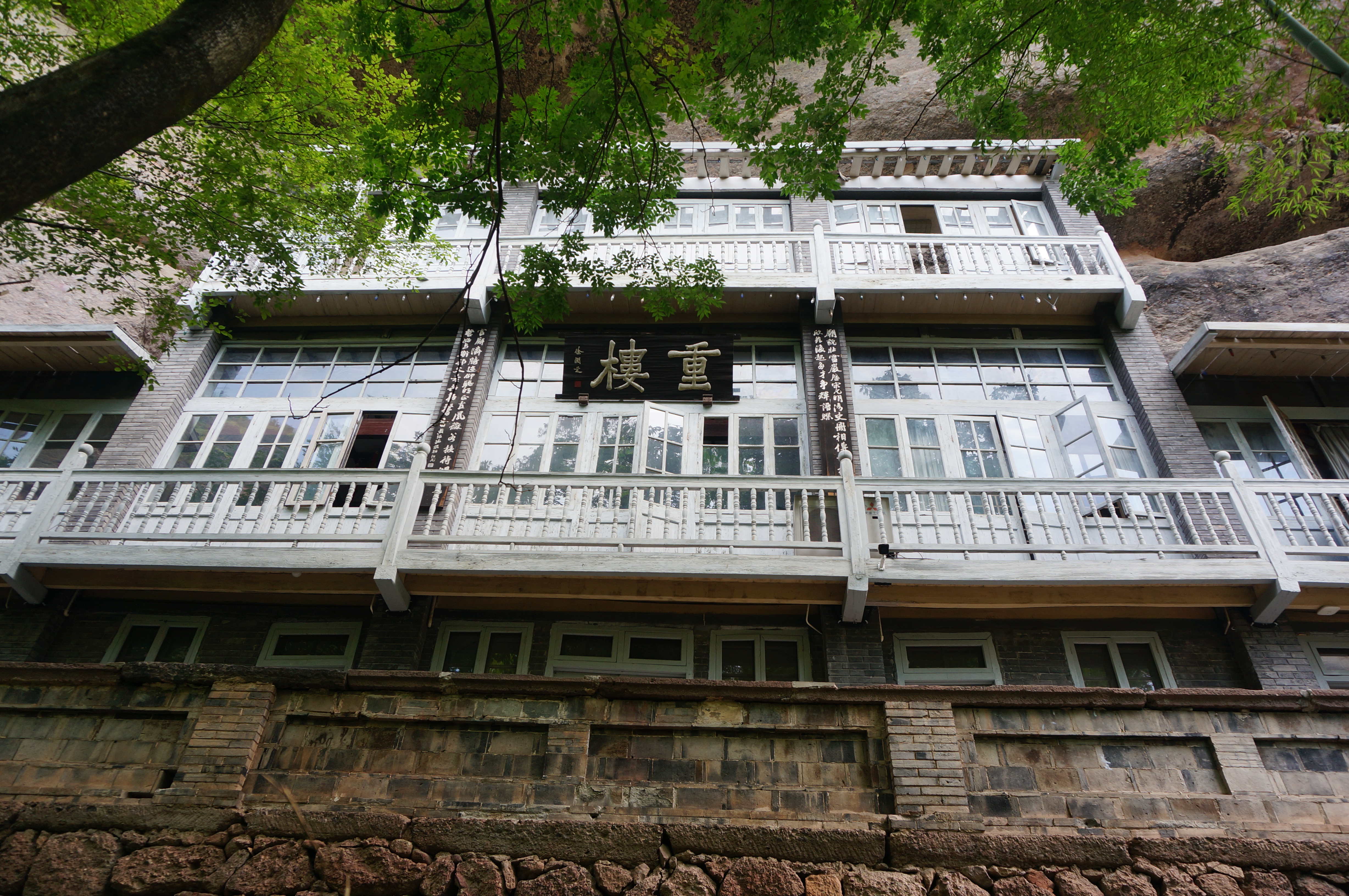 永康抗战时期浙江省政府及相关机构旧址之原浙江省政府及秘书处旧址（重楼，1938年1月-1942年5月），南面。